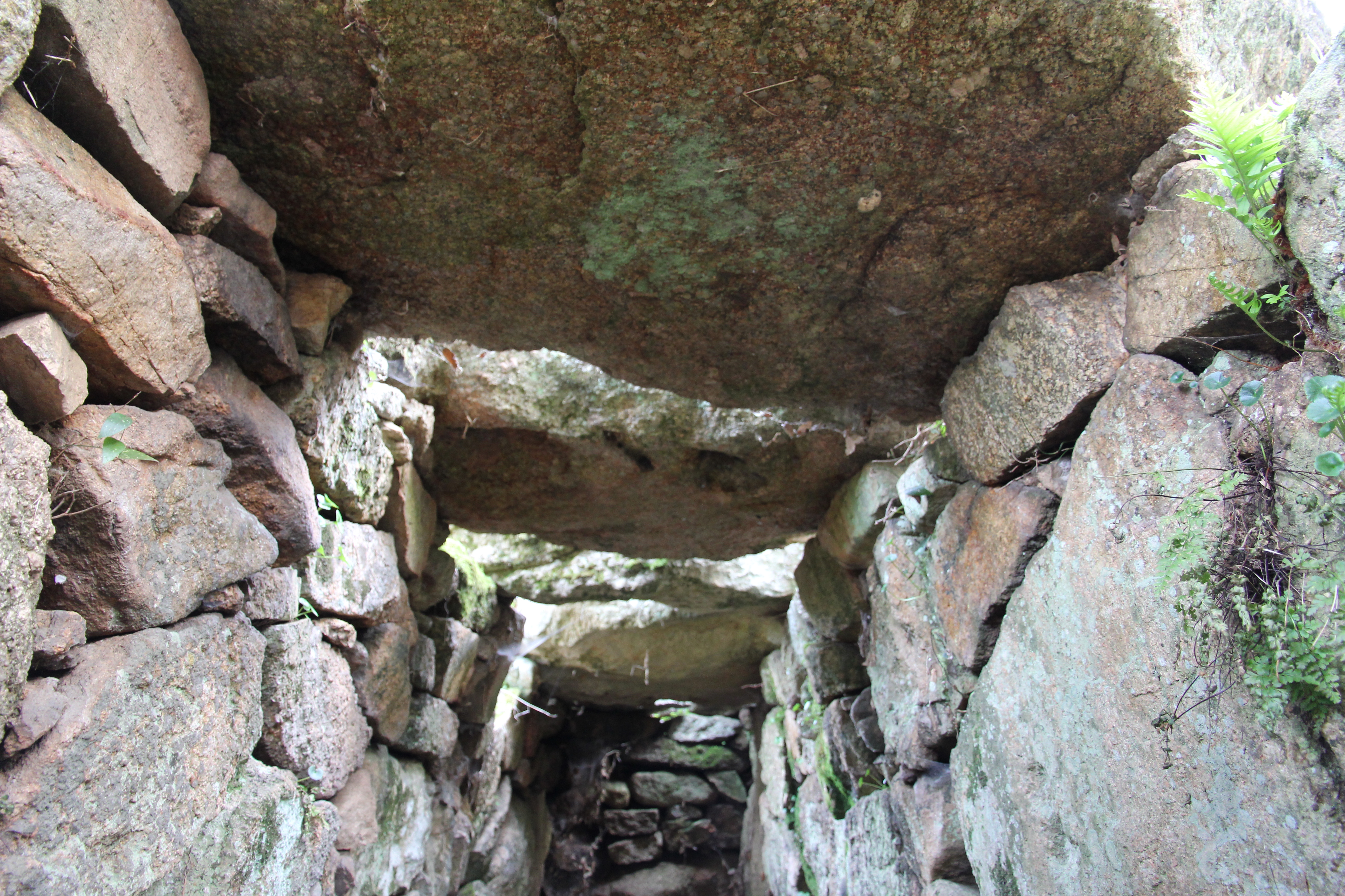 Tomba dei giganti di Pascaredda - m 442 s.l.m.